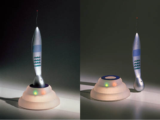 1991 prossimo 02 72dpi